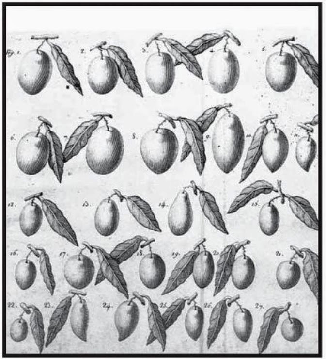 Varietà di olive; tavola pubblicata nel trattato di Giovanni Presta Degli ulivi, delle ulive, e della maniera di cavar l'olio 1794, a Napoli, Italia.